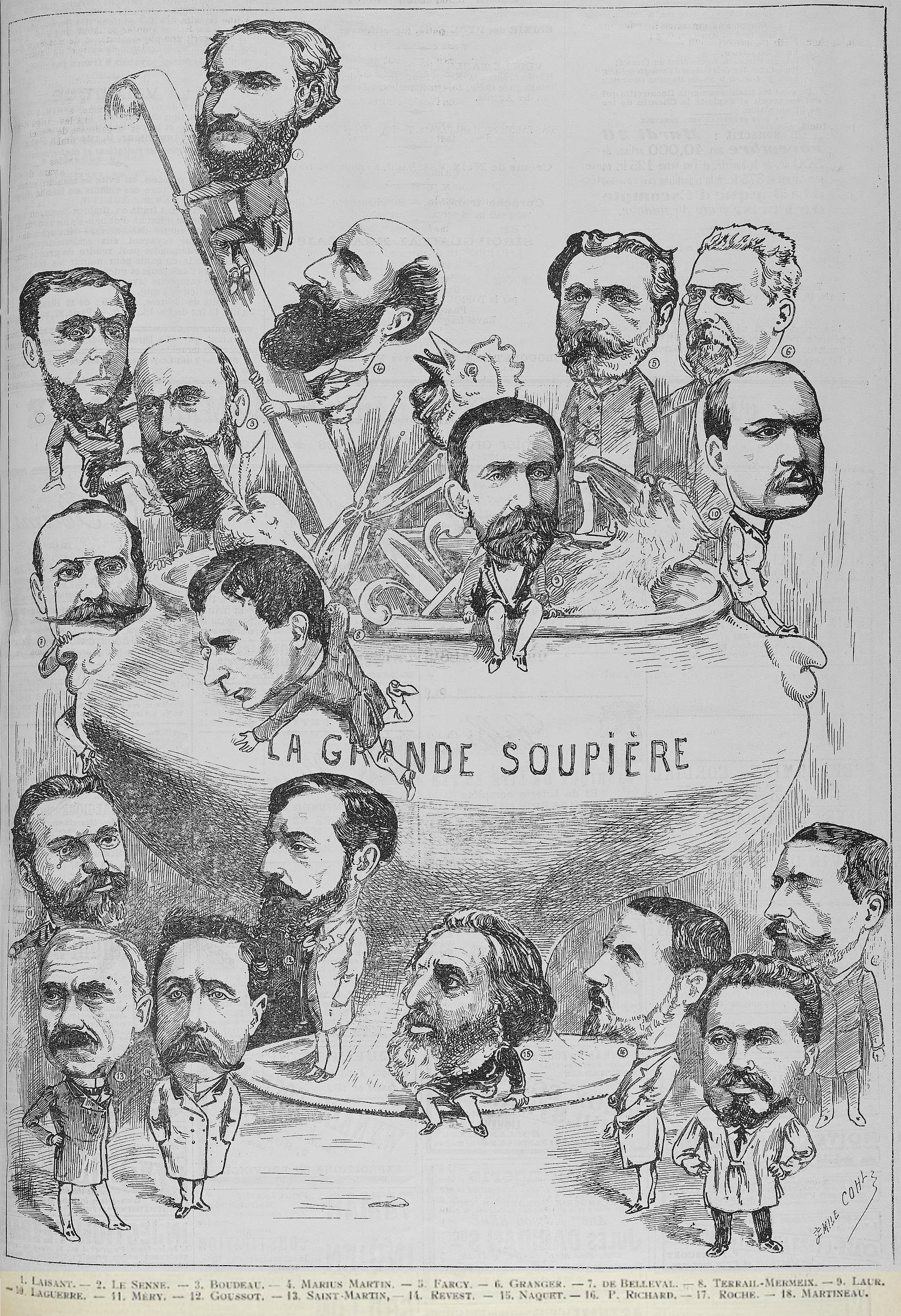 "Les députés de la Seine - 2e série. - Côté boulangiste".